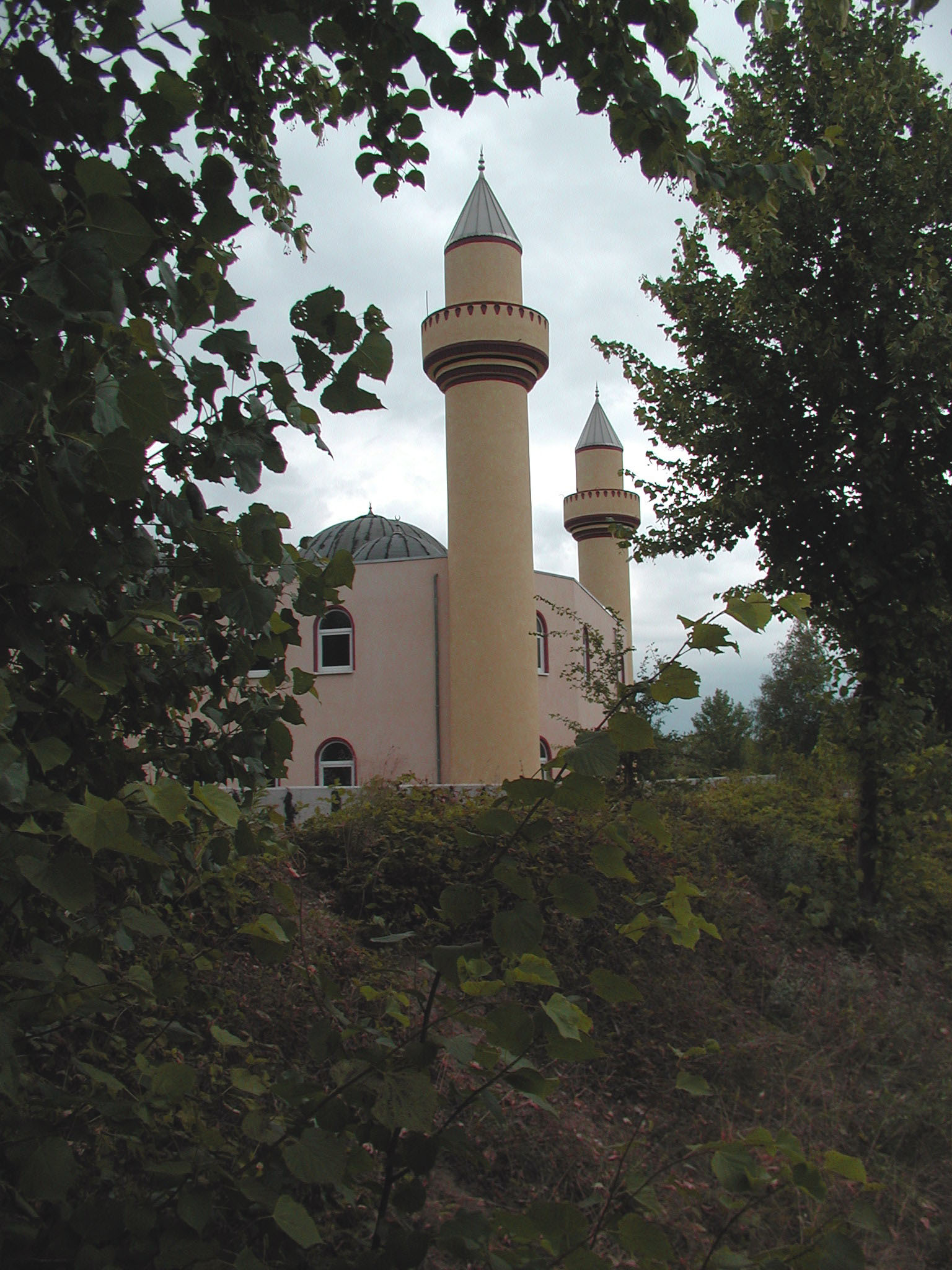 Alt Hürth